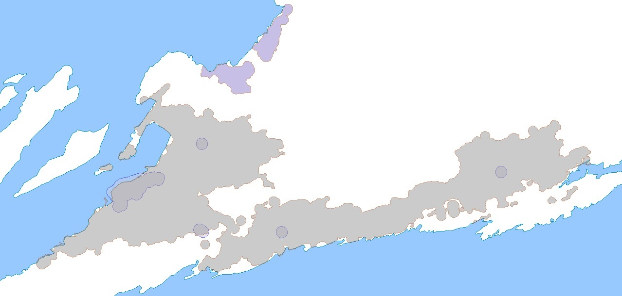 Tettstedskart over Bodø. Tettstedet Bodø er markert med grått, mens sentrumssoner er markert med blått. Lilla farge definerer tettstedet Løpsmarka.